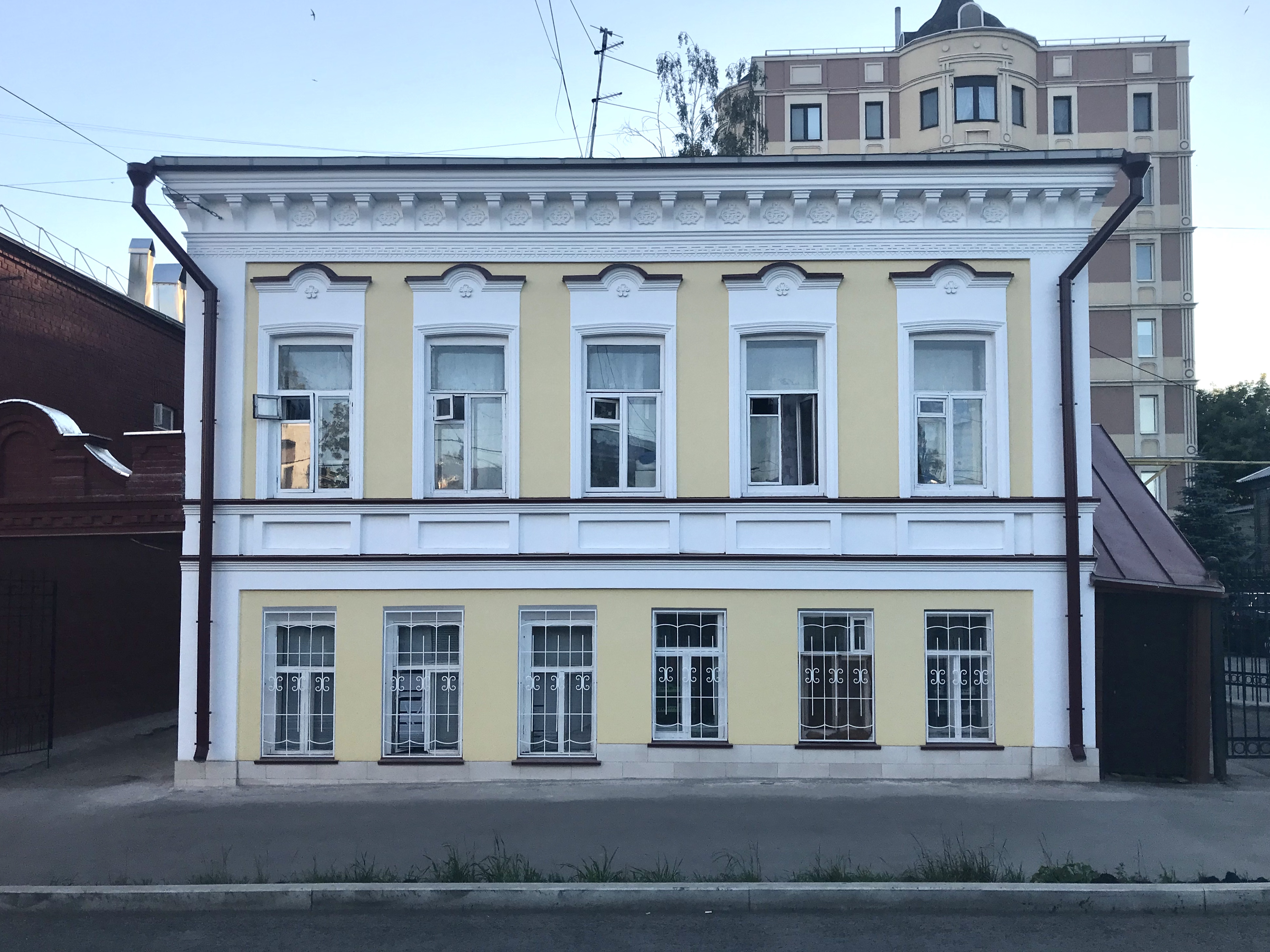 Дом Горина